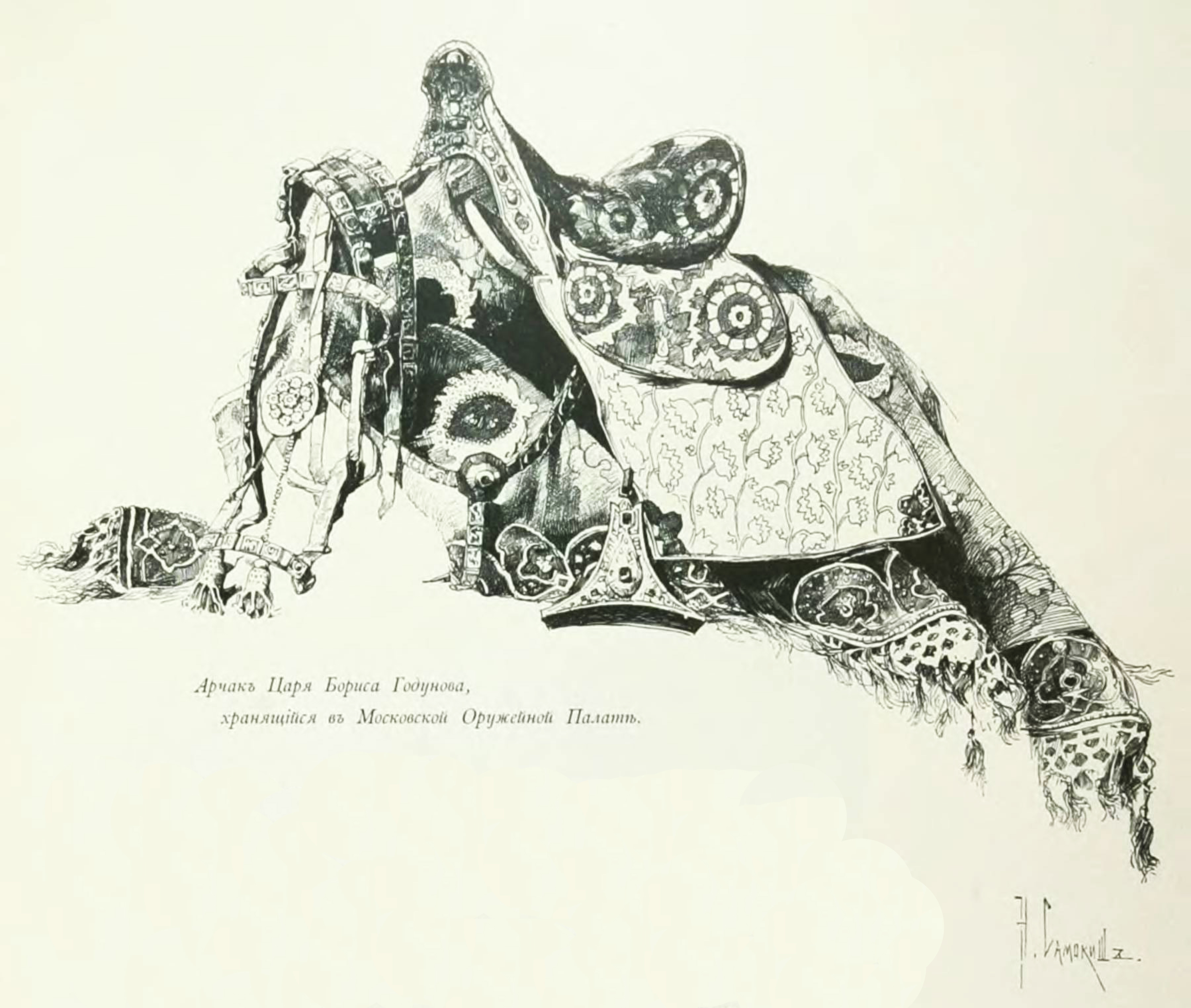 Великокняжеская, царская и императорская охота на Руси